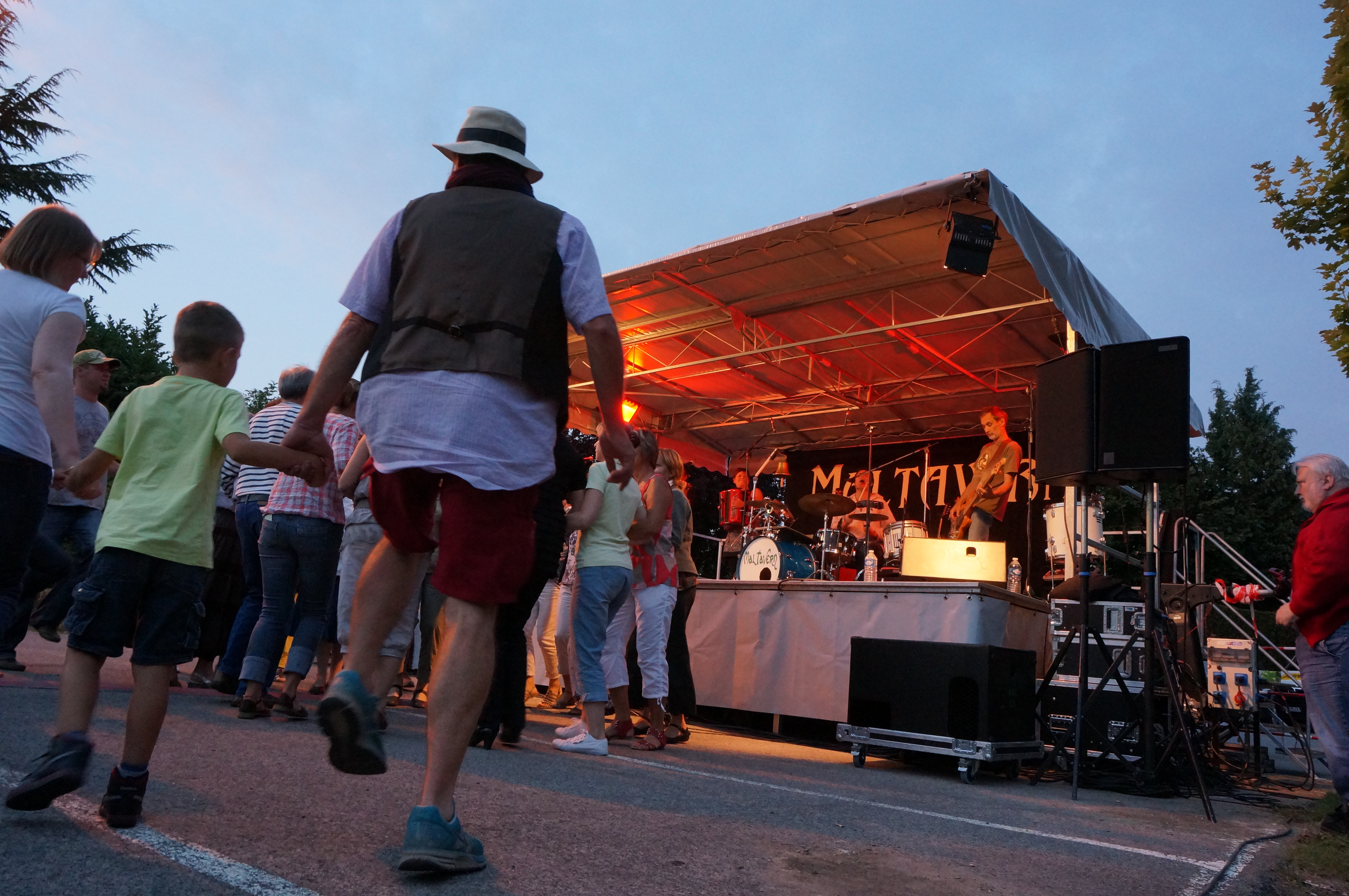 Le public danse pendant le concert .